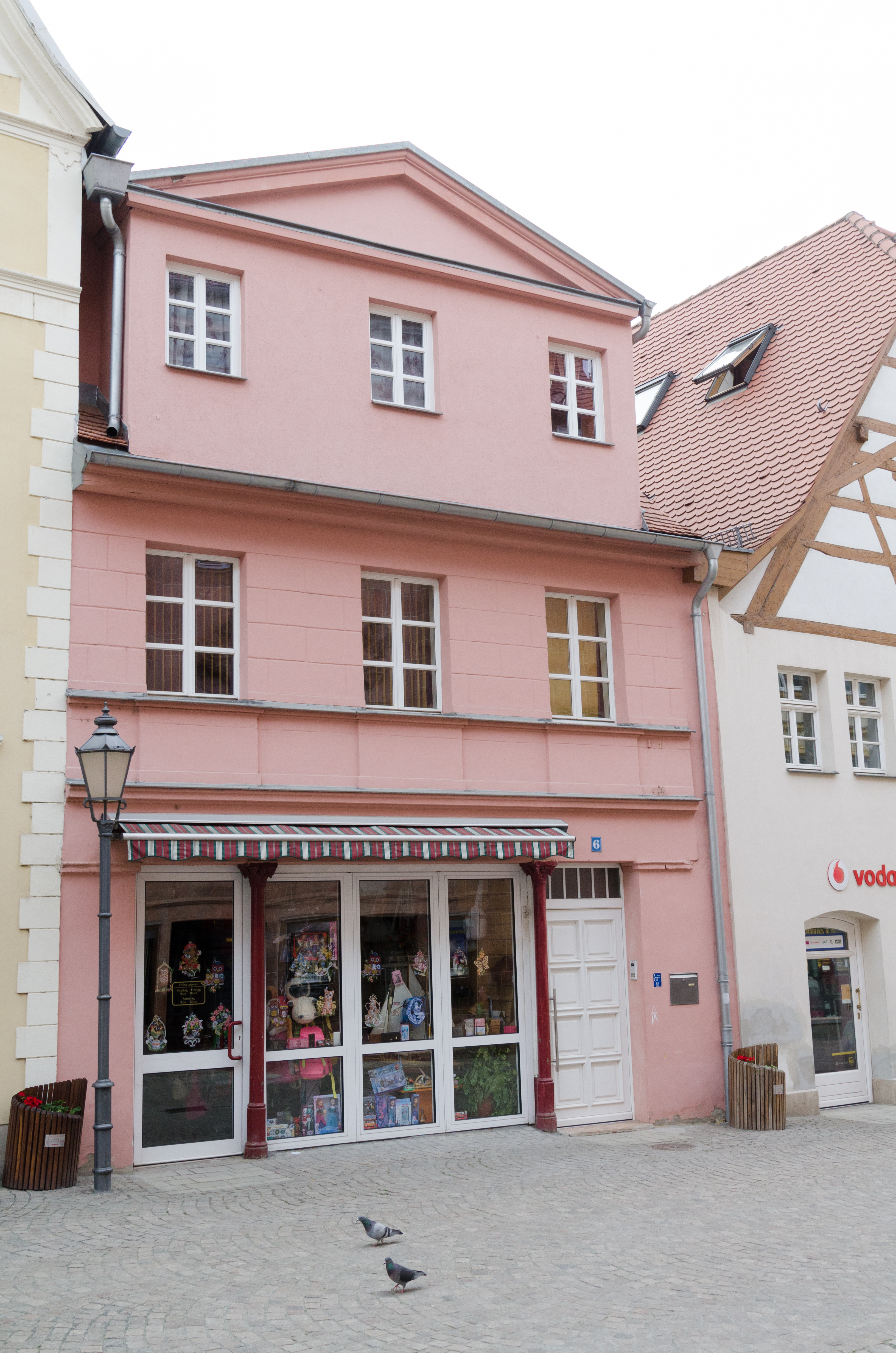 Zeitz, Judenstraße 6